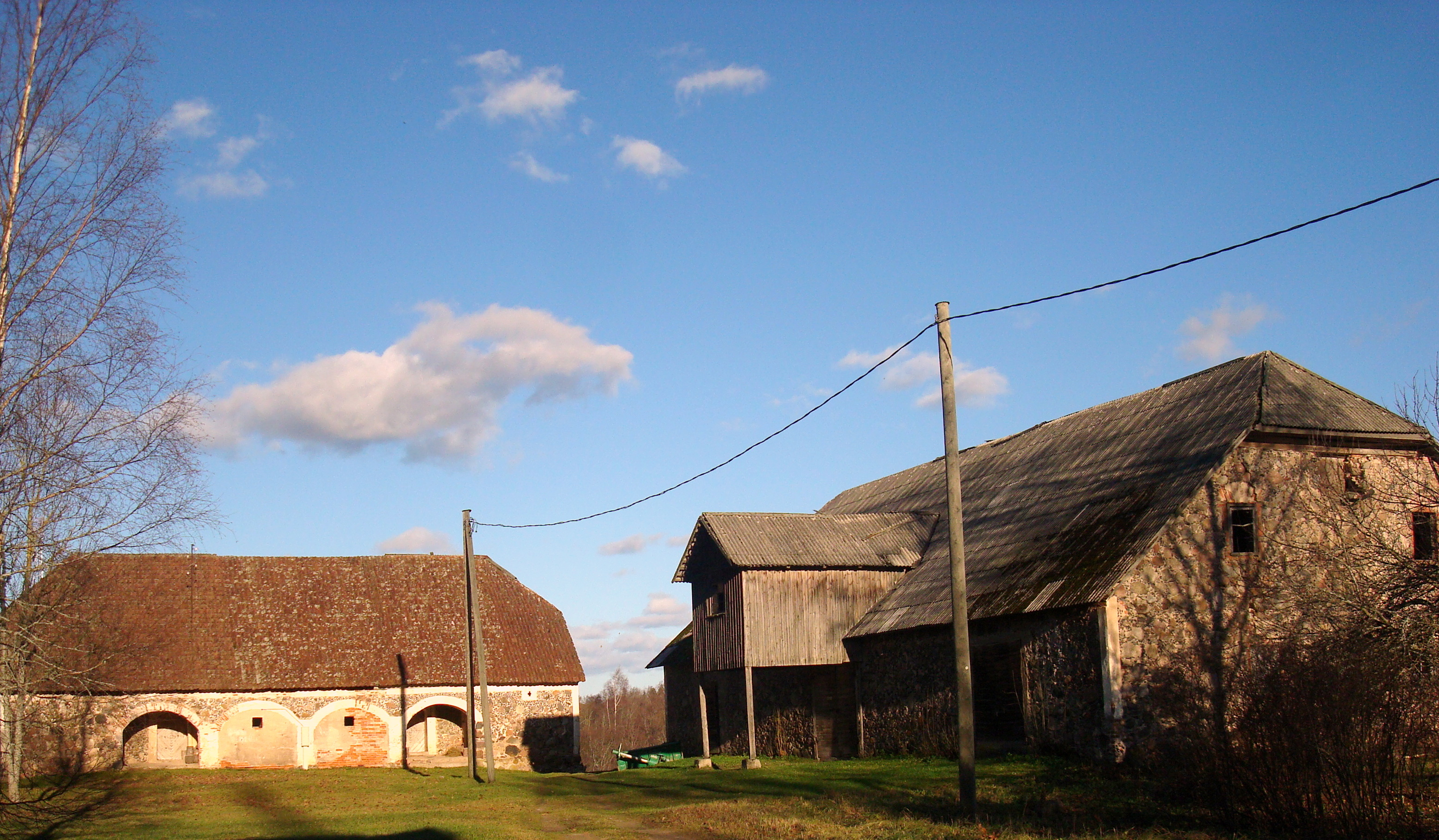 Lodes muižas saimniecības ēkas